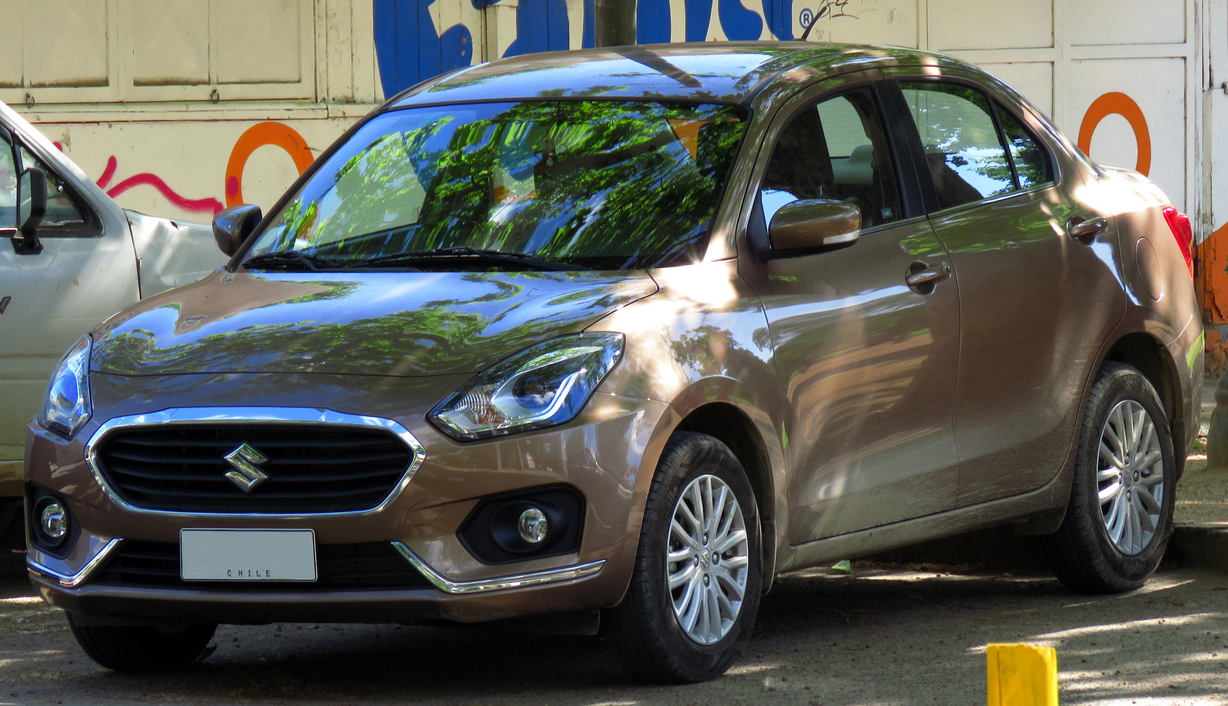 Suzuki Dzire 1.2 GL Sport 2018